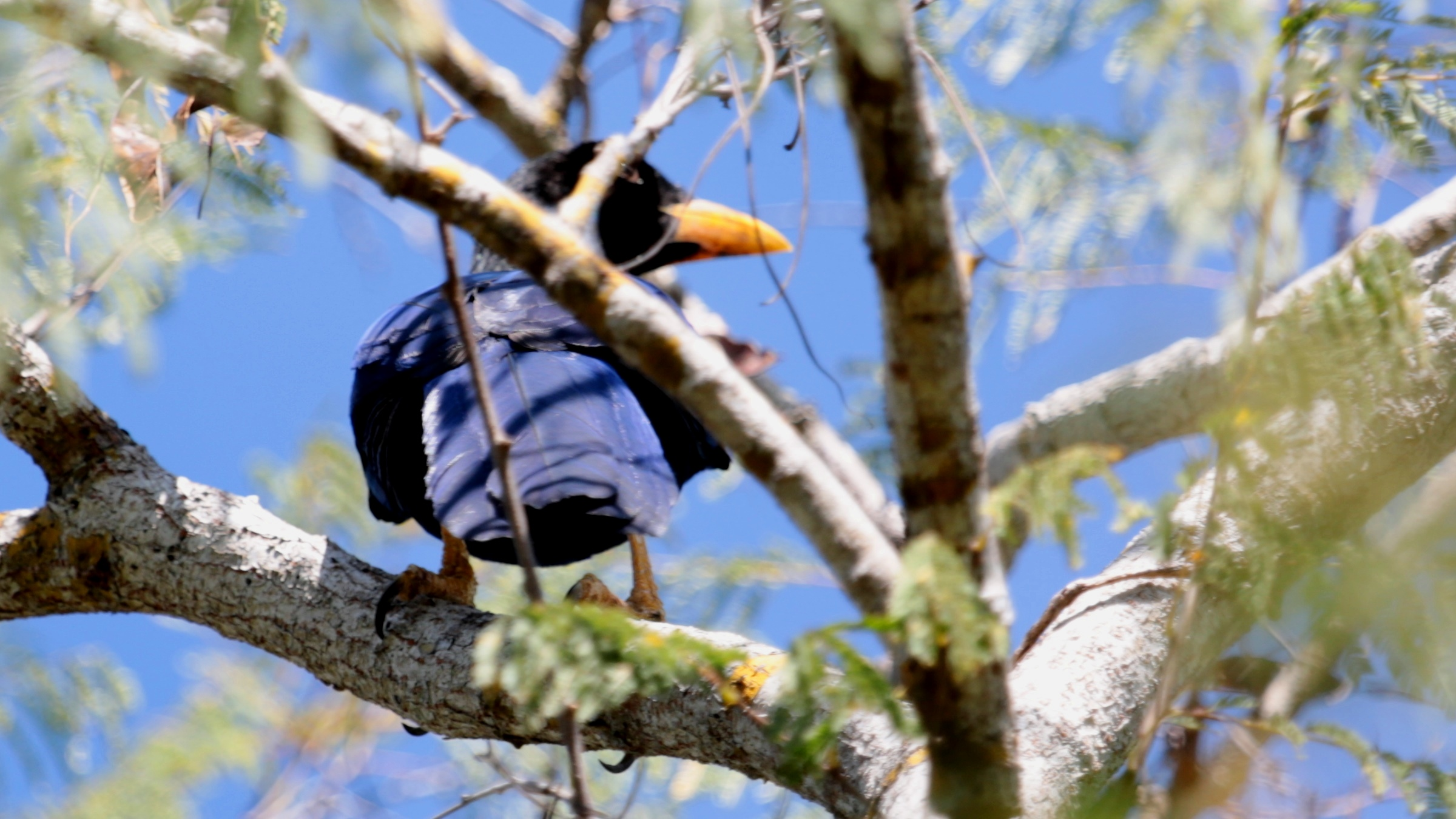 Chara de Beechy